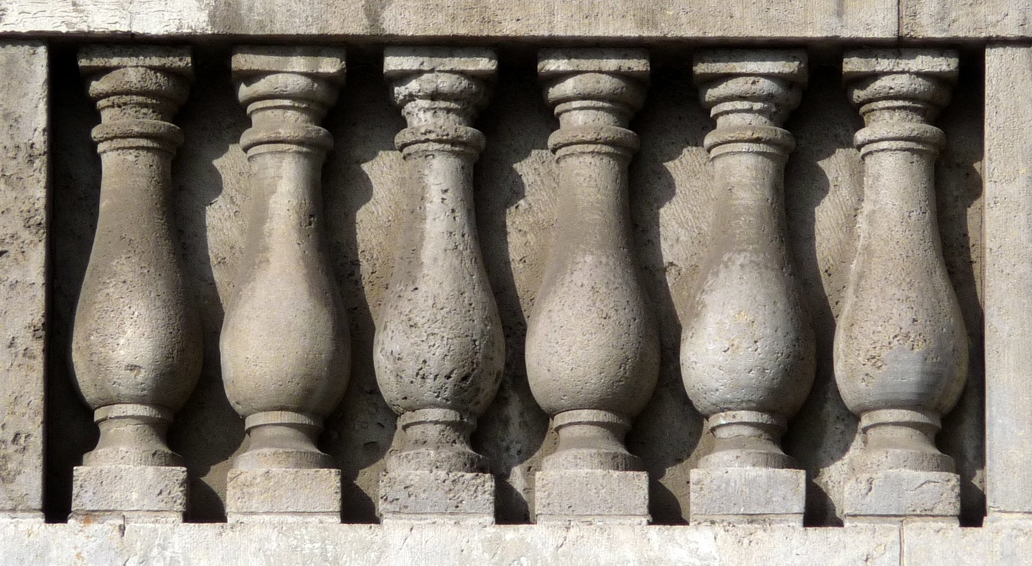 Lessing-Gymnasium in Berlin-Mitte, Dockenbrüstung